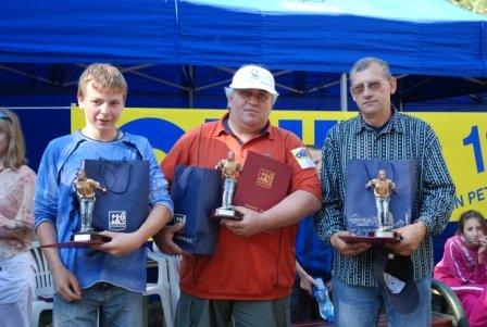 Zwycięzcy w Pierwszym Turnieju "Petanque" o Puchar Prezydenta Miasta Katowice rozegranego w parku Kościuszki w dniu 16.06.2007. Na zdjęciu stoją od lewej: Sosna Konrad, Korwin Roman, Munikowski Andrzej.